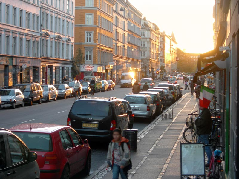 Istedgade 1650 KBH V. Billedet er taget af Rasmus Riemann ud for Istedgade 98 mod Enghave Plads i sensommeren 2006.